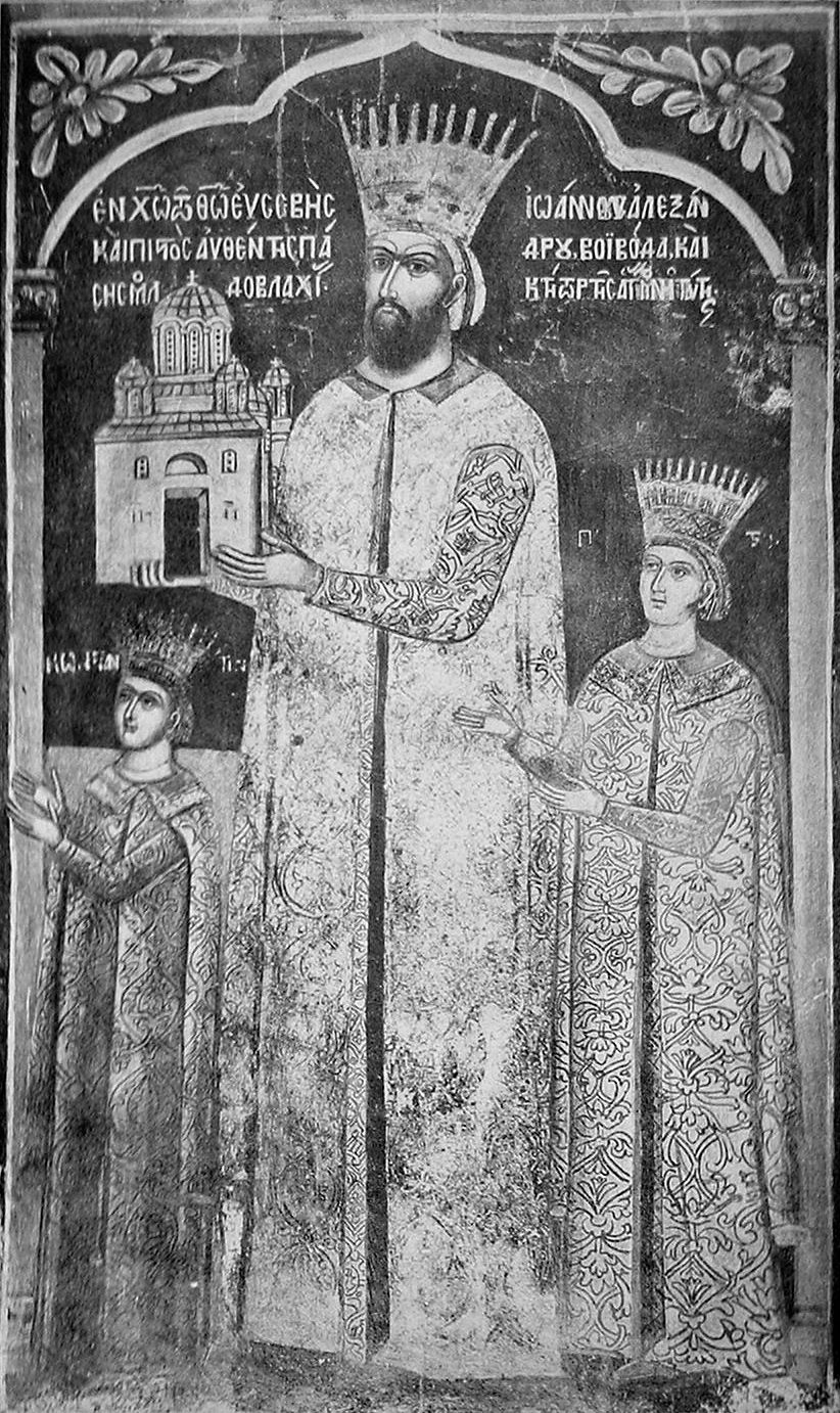 Alexandru Lăpuşneanul at Athos.